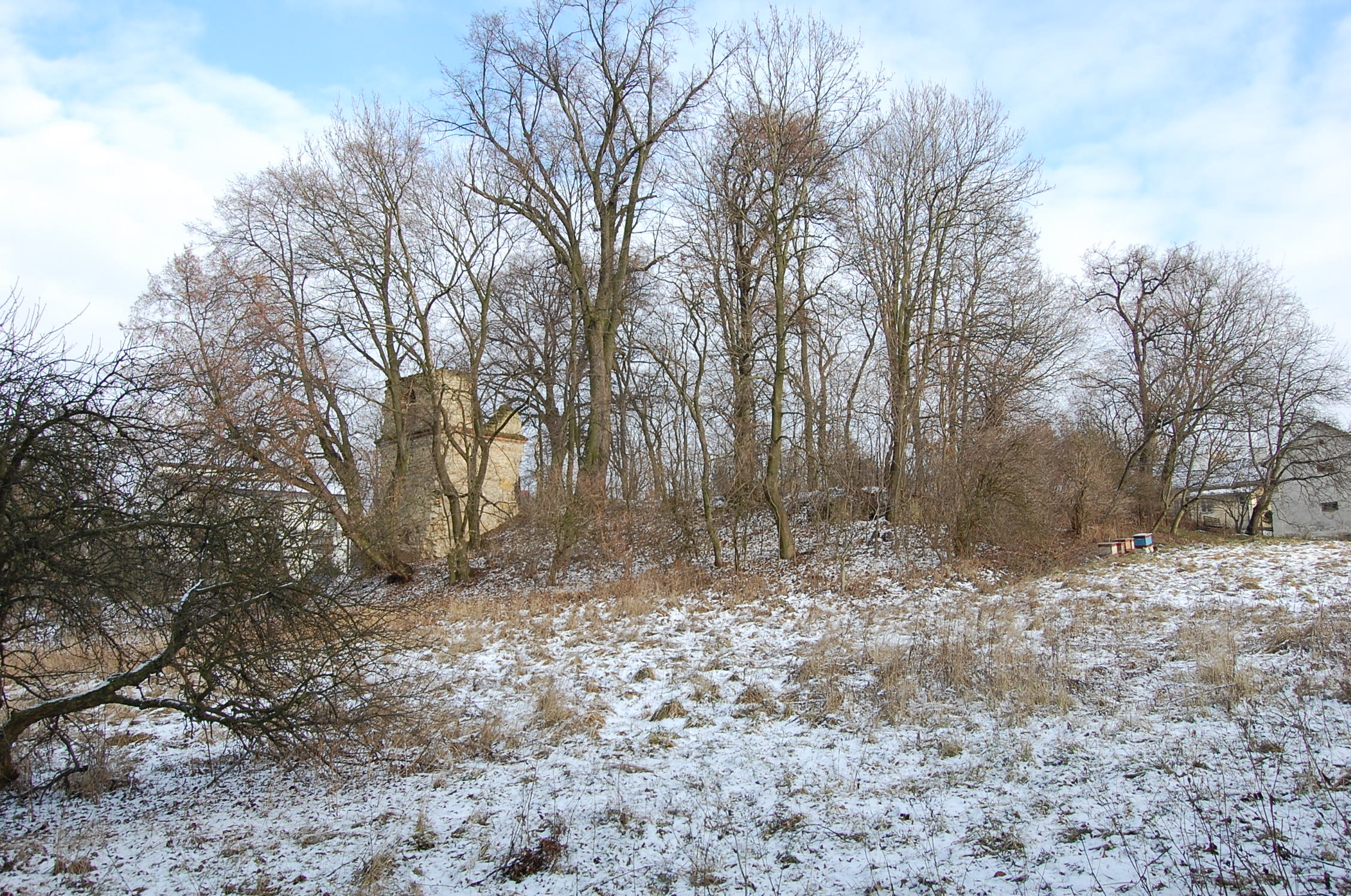 Miejsce gdzie niegdyś stał kościół w Konopnicy, obok dzwonnica